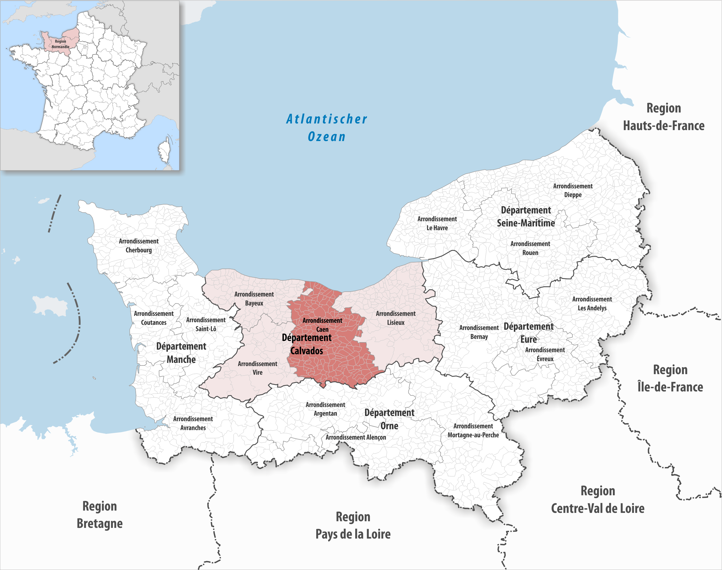 Lage des Arrondissements Caen